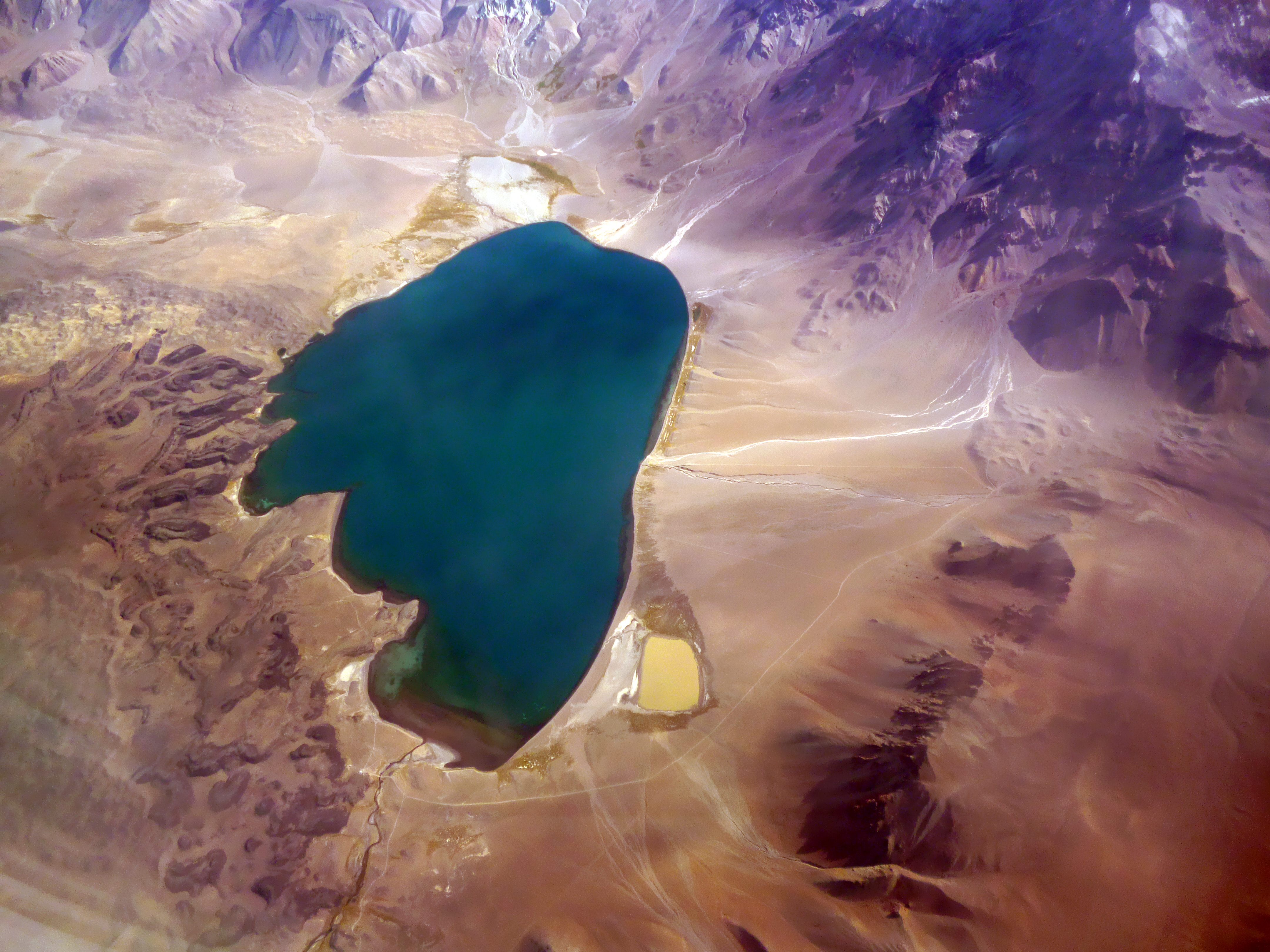 Laguna del Diamante, Argentina tomada desde un vuelo en avión.